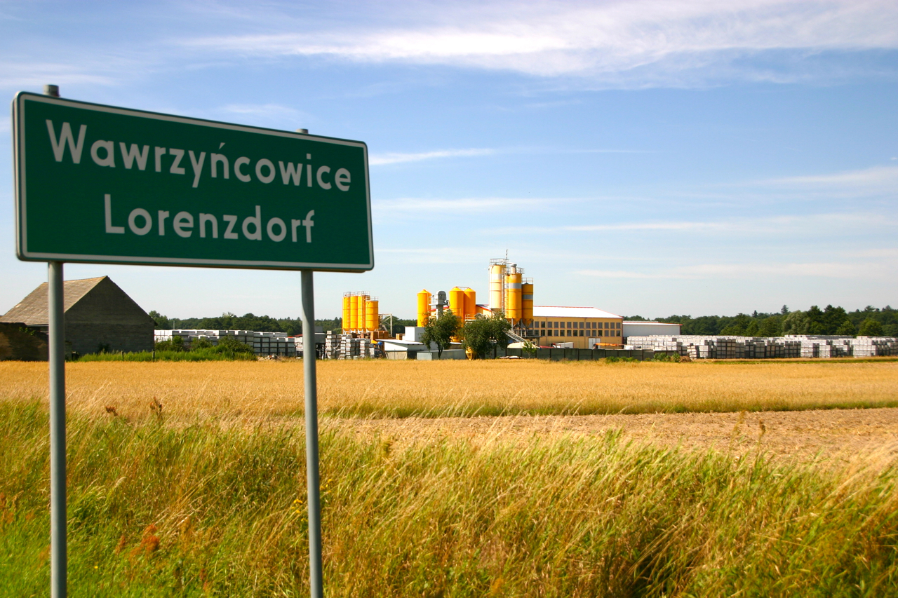 Wawrzyńcowice (dodatkowa nazwa w j. niem. Lorenzdorf) – wieś w Polsce położona w województwie opolskim, w powiecie krapkowickim, w gminie Strzeleczki.